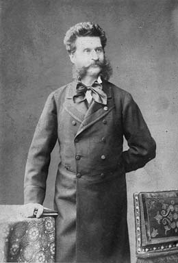 Johann Strauß († 3. Juni 1899) im Gehrock